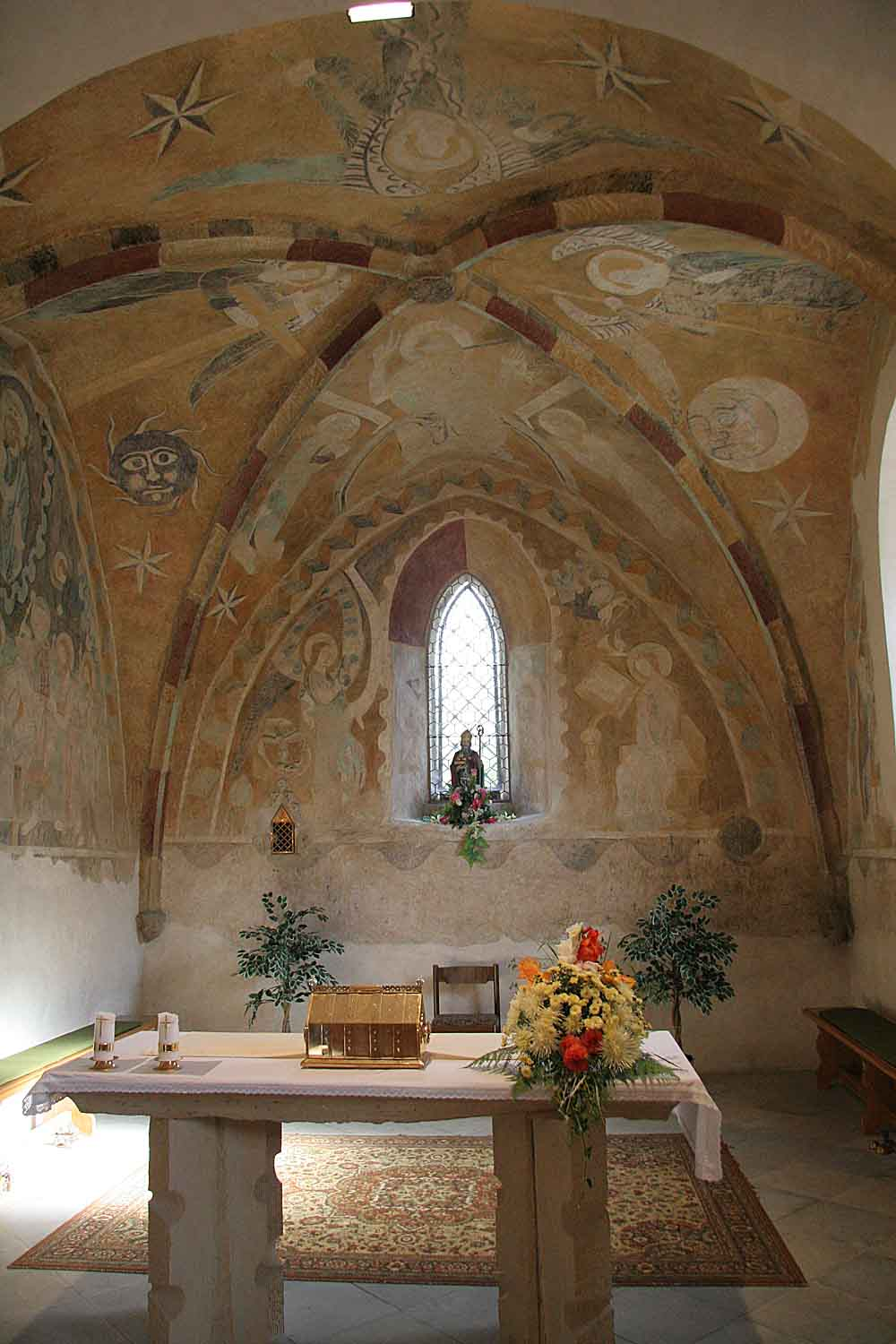 Starý Svojanov, kostel Svatého Mikuláše, Presbytář s gotickými freskami, district Svitavy, Czech Republic autor:Prazak date:9. 9. 2006